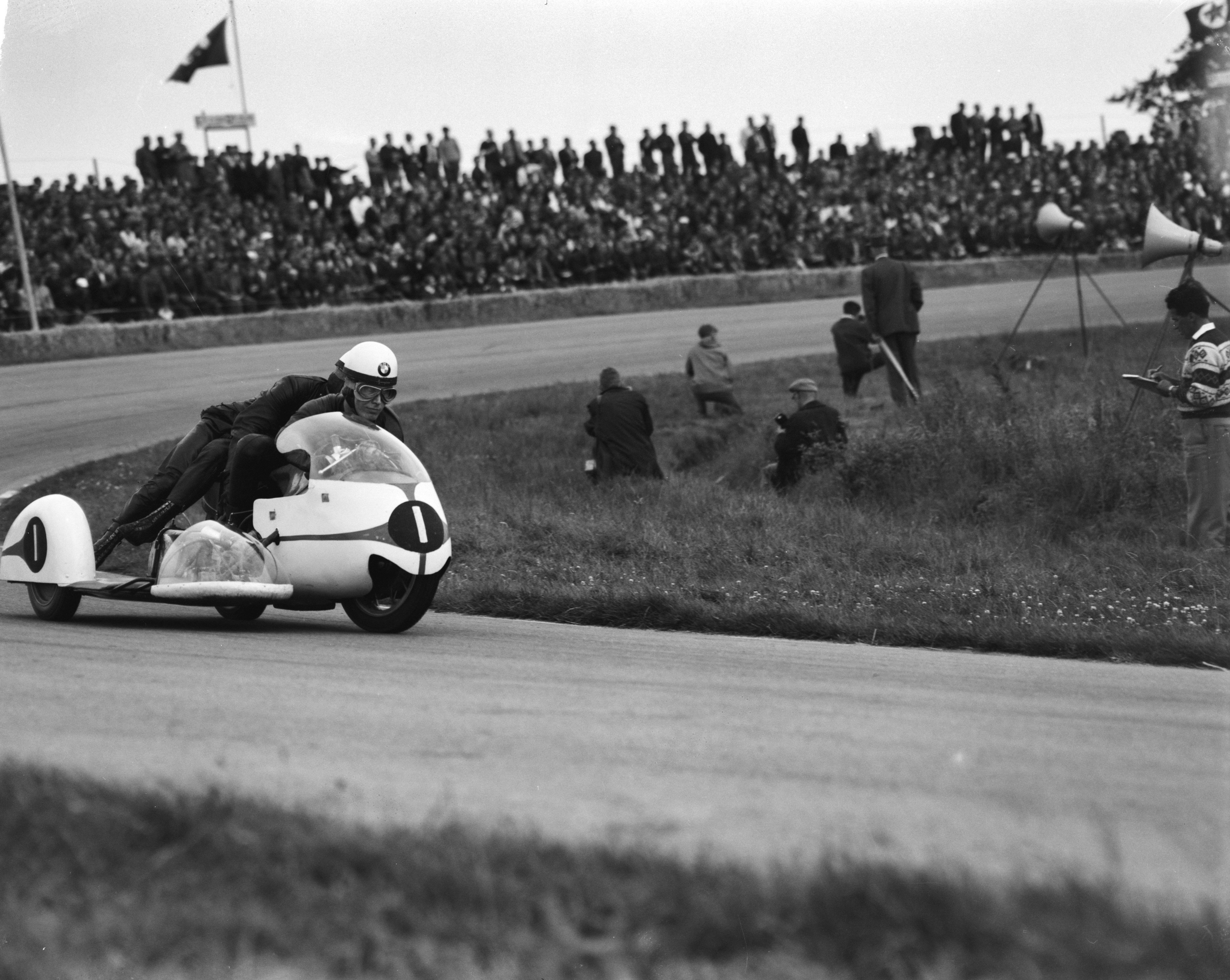 Collectie / Archief : Fotocollectie Anefo Reportage / Serie : TT Assen 1963 Beschrijving : TT te Assen. De zijspan klasse. Nummer 1 Deubel met Hoerner (Duitsland) Datum : 29 juni 1963 Locatie : Assen Trefwoorden : motoren, motorsport, races Instellingsnaam : TT Fotograaf : Bilsen, Joop van / Anefo Auteursrechthebbende : Nationaal Archief Materiaalsoort : Negatief (zwart/wit) Nummer archiefinventaris : bekijk toegang 2.24.01.04 Bestanddeelnummer : 915-3154